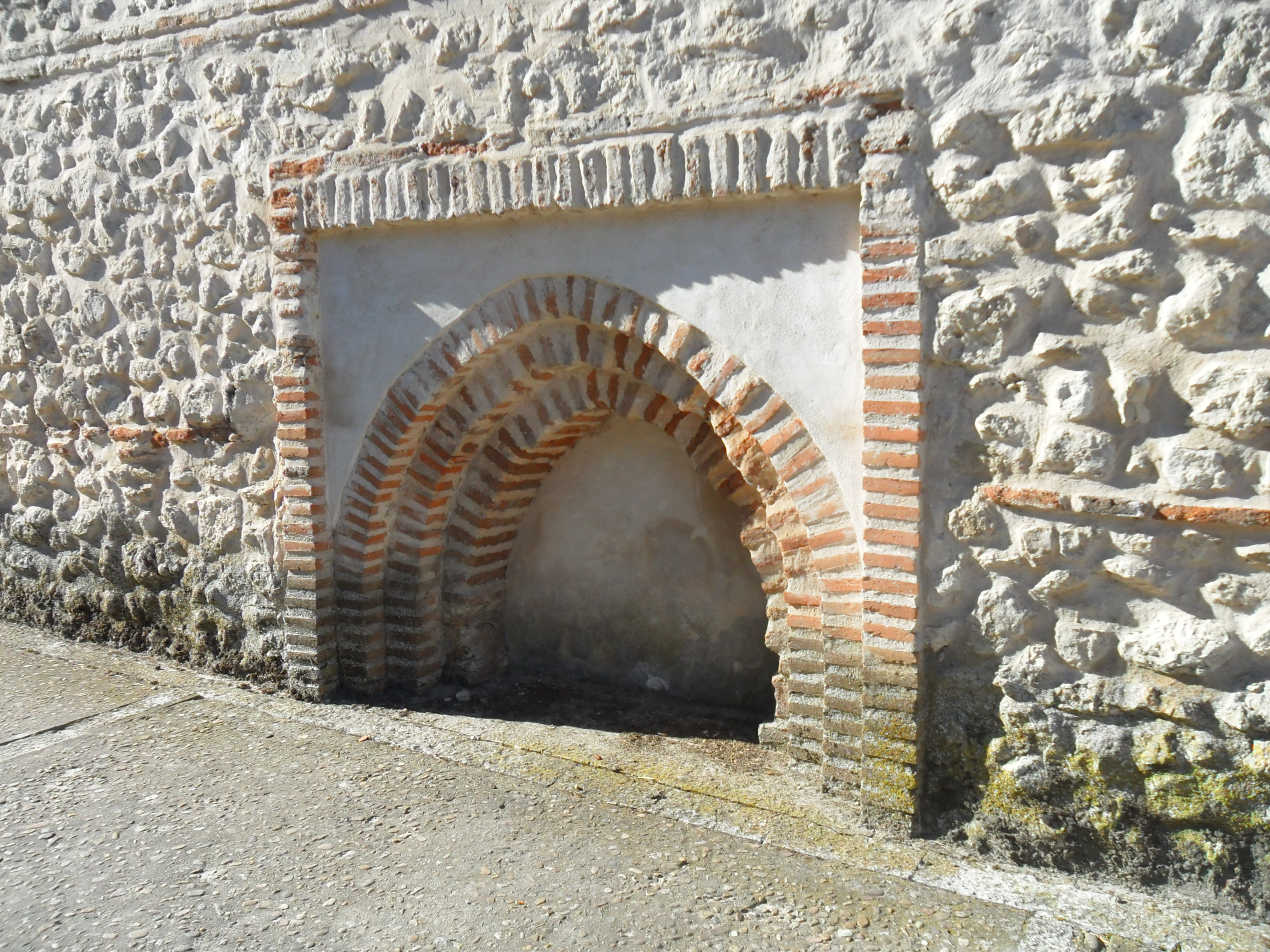 Barras para asar lechazo al pincho y detalle